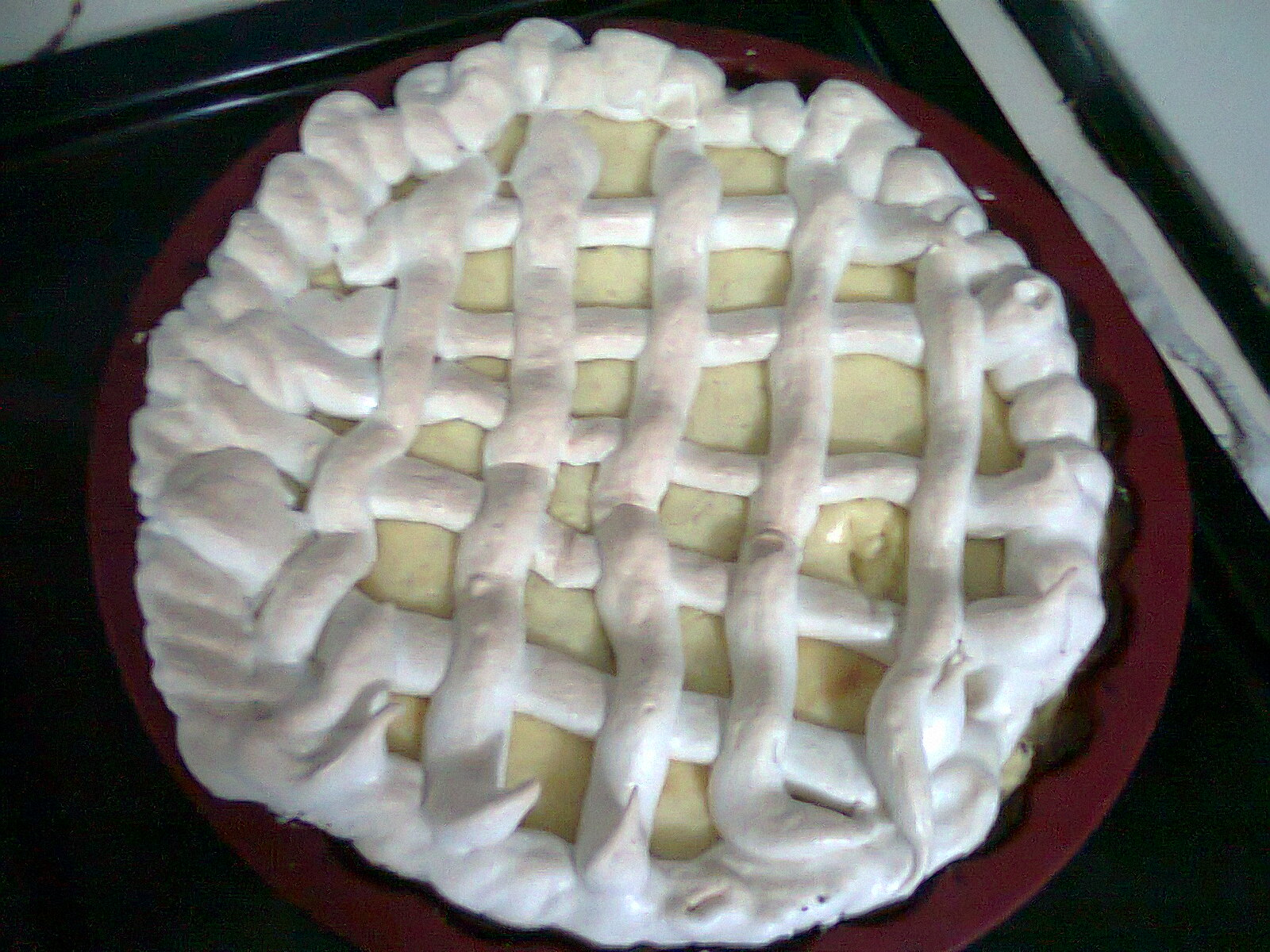 un pie de araza